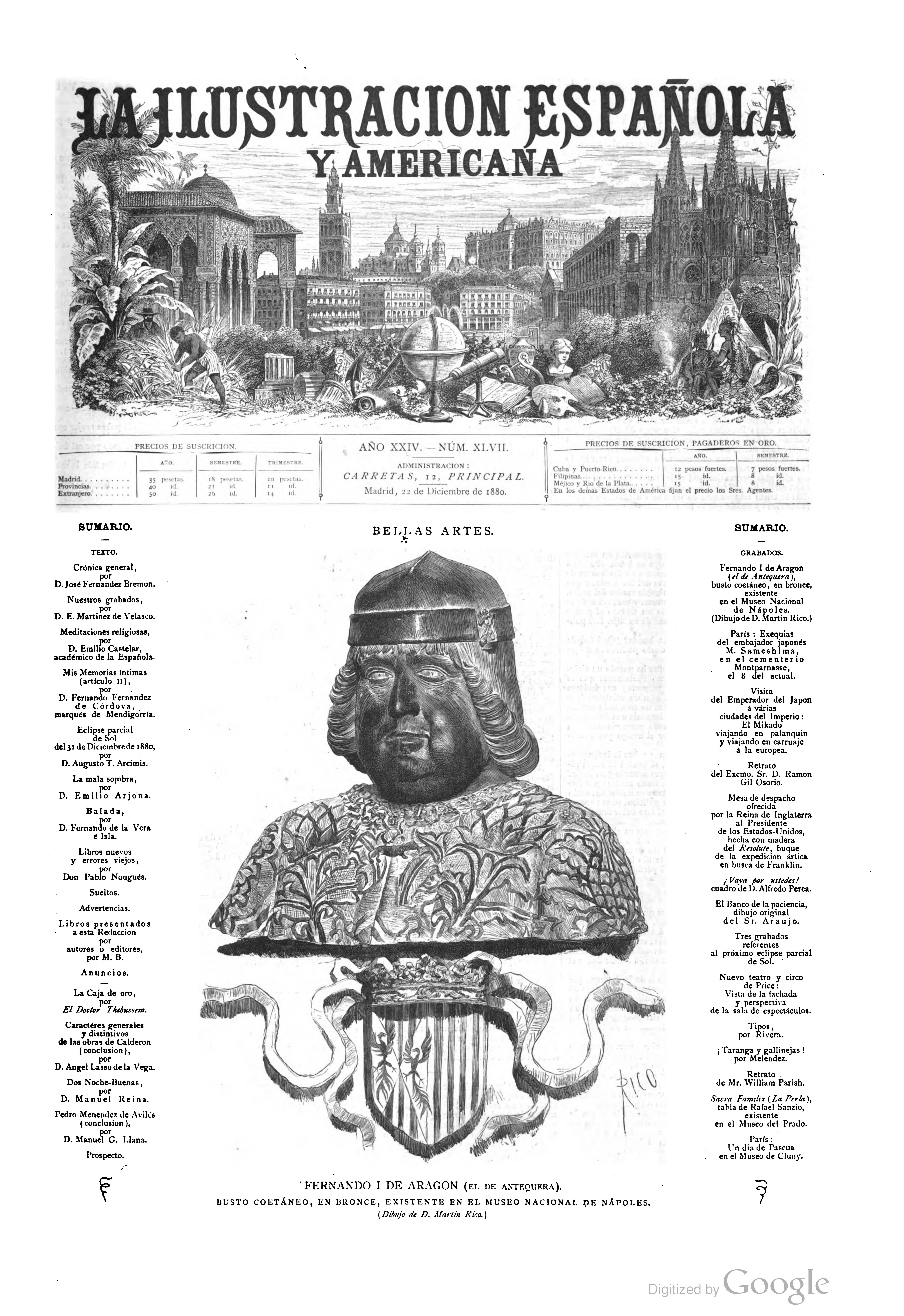 Fernando I de Aragón (el de Antequera). Busto coetáneo, en bronce, existente en el Museo Nacional de Nápoles. (Dibujo de D. Martín Rico.).